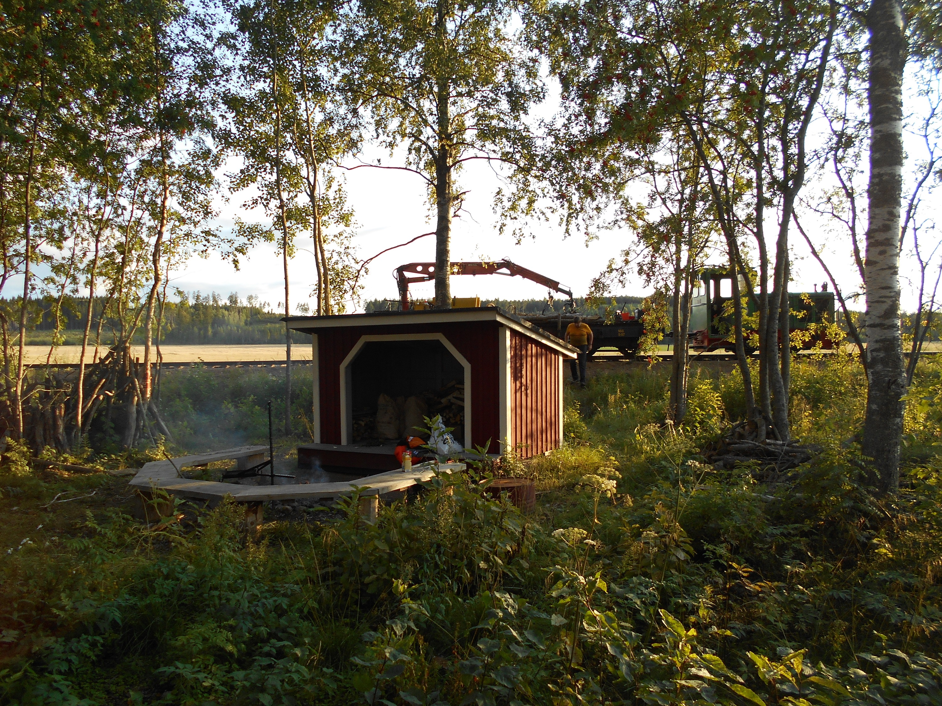 Santavaihteen laavu kesällä 2017